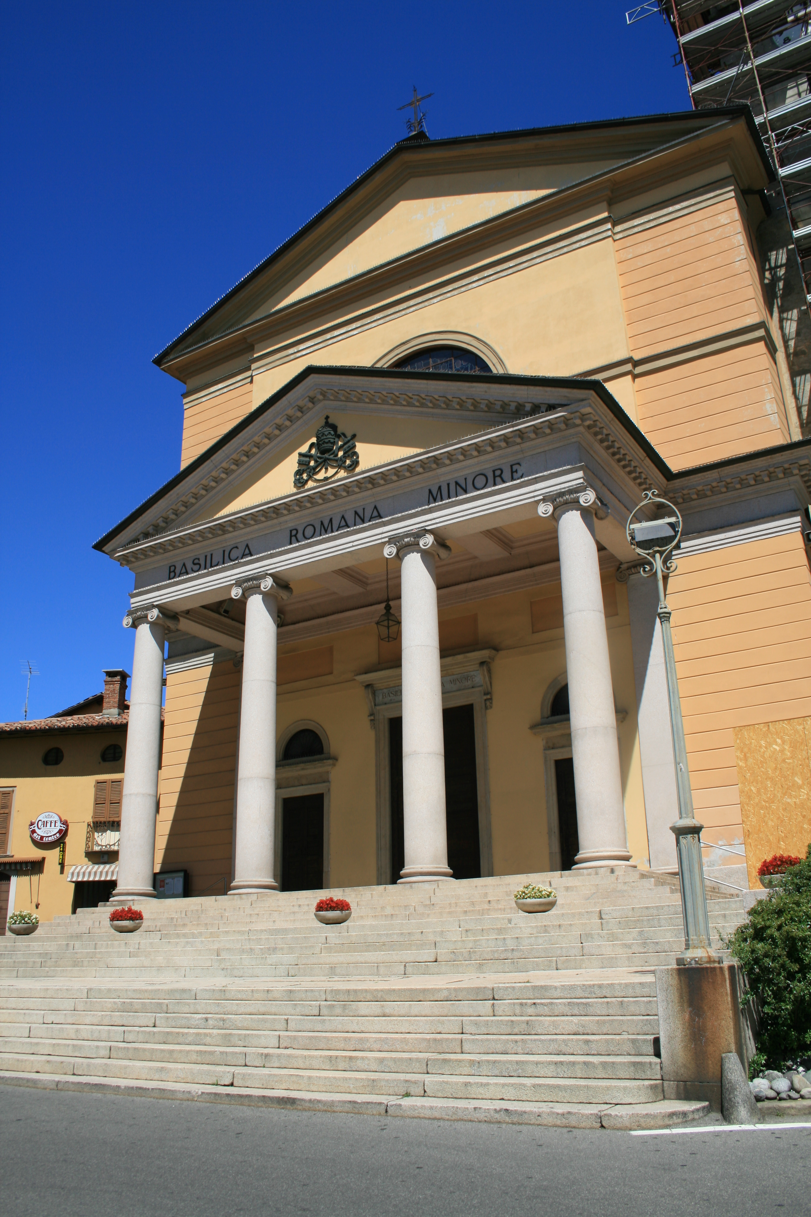 Basilica Romana Minore